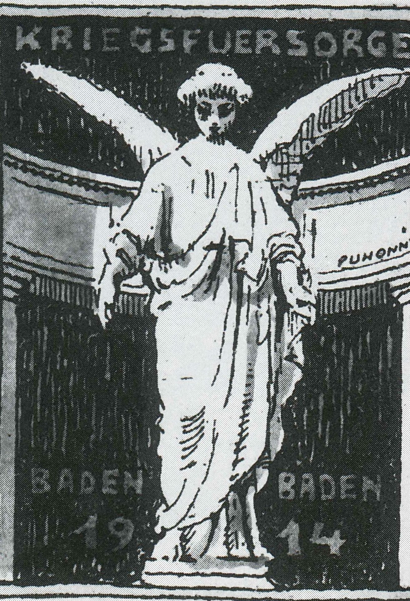 Federzeichnung für die Kriegsfürsorge